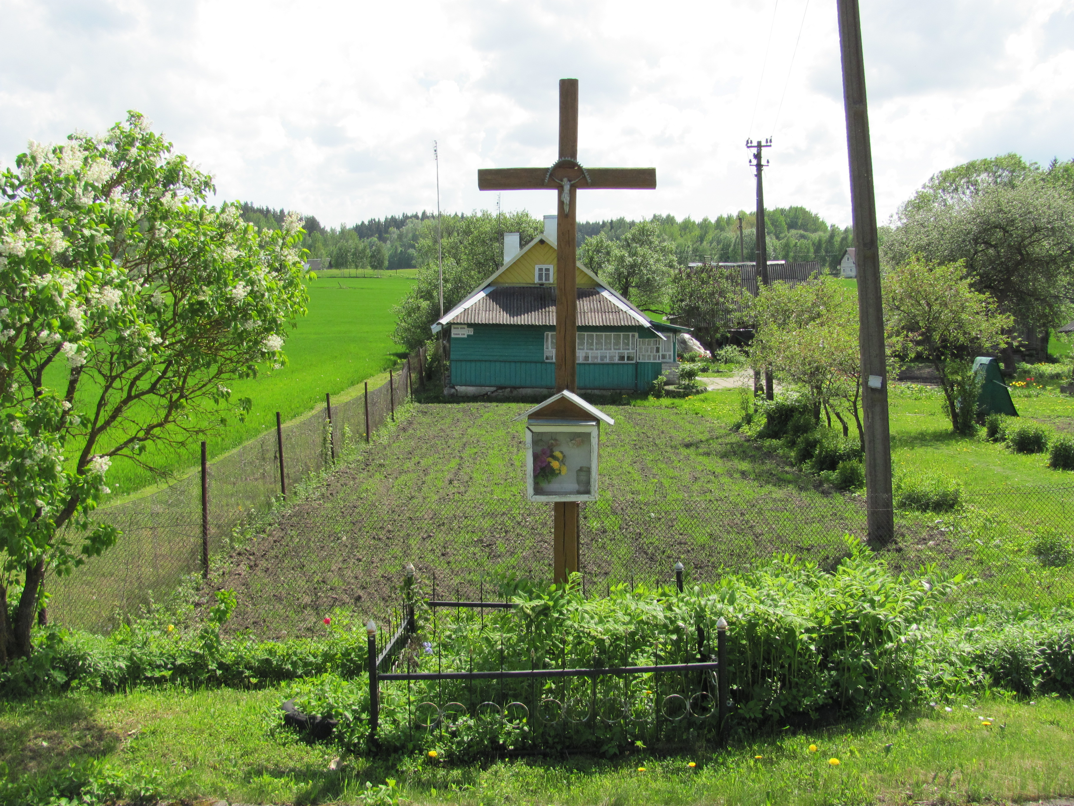 Šatrininkų sen., Lithuania